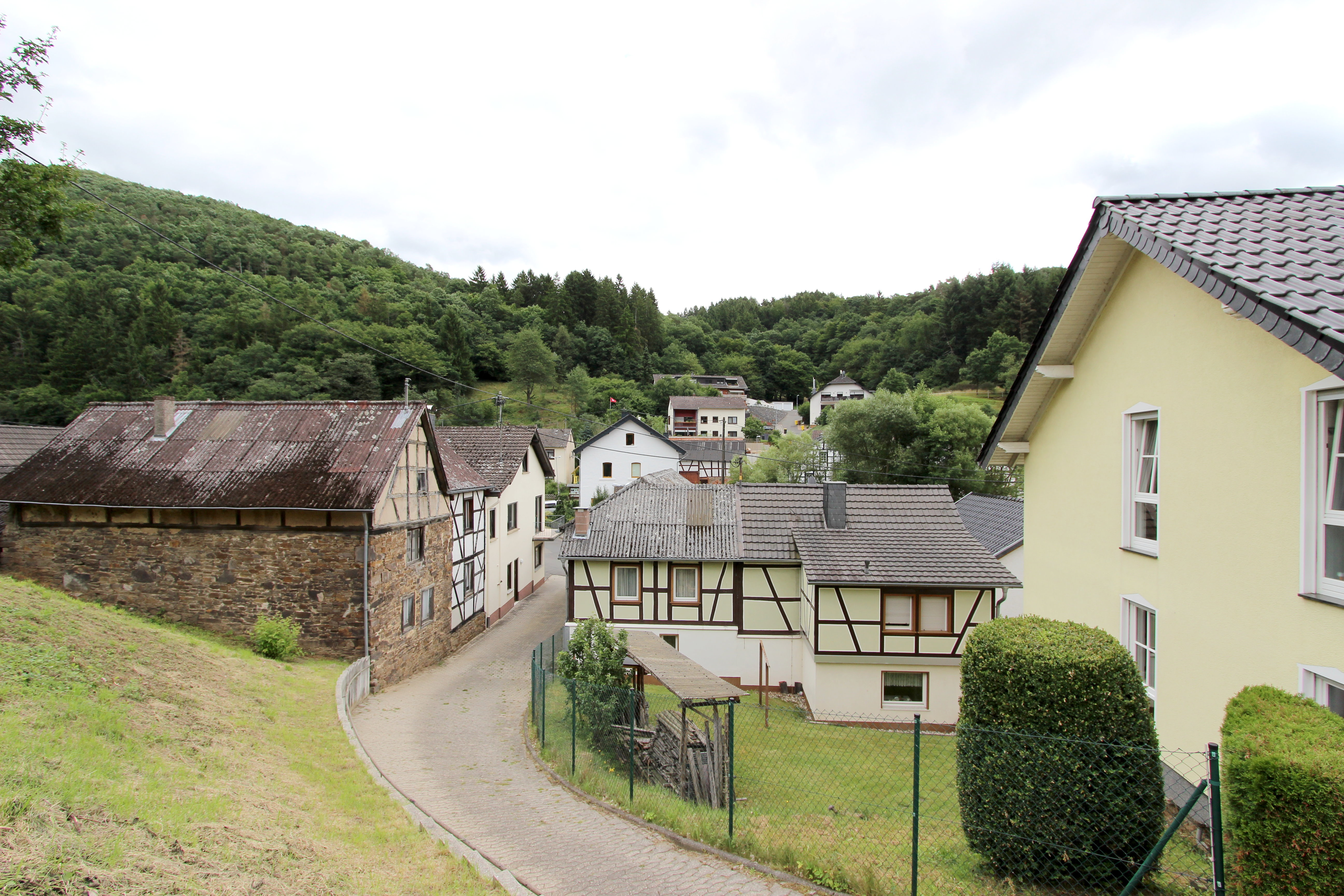 53505 Kirchsahr, Kirchweg. Blick in die Ortsmitte von Kirchsahr. Aufnahme von 2017.